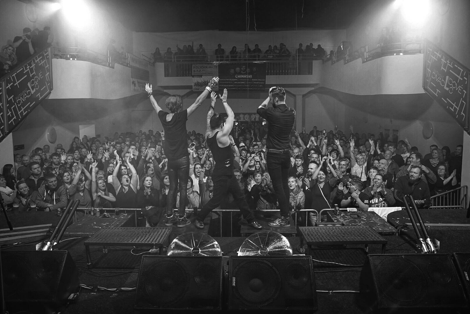 Civilní Obrana - děkovačka